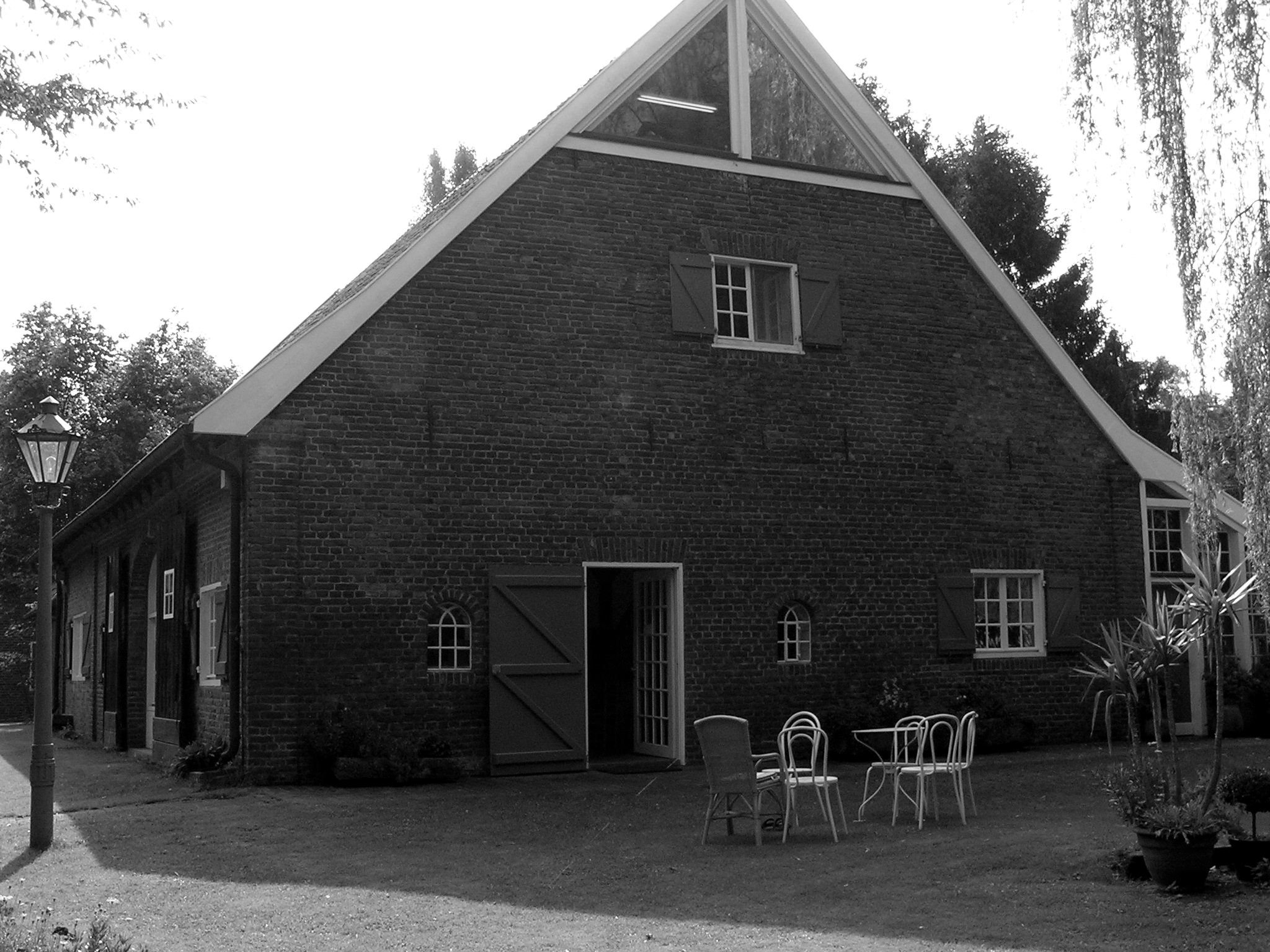 Haus Esselt, Otto-Pankok-Museum, Hünxe